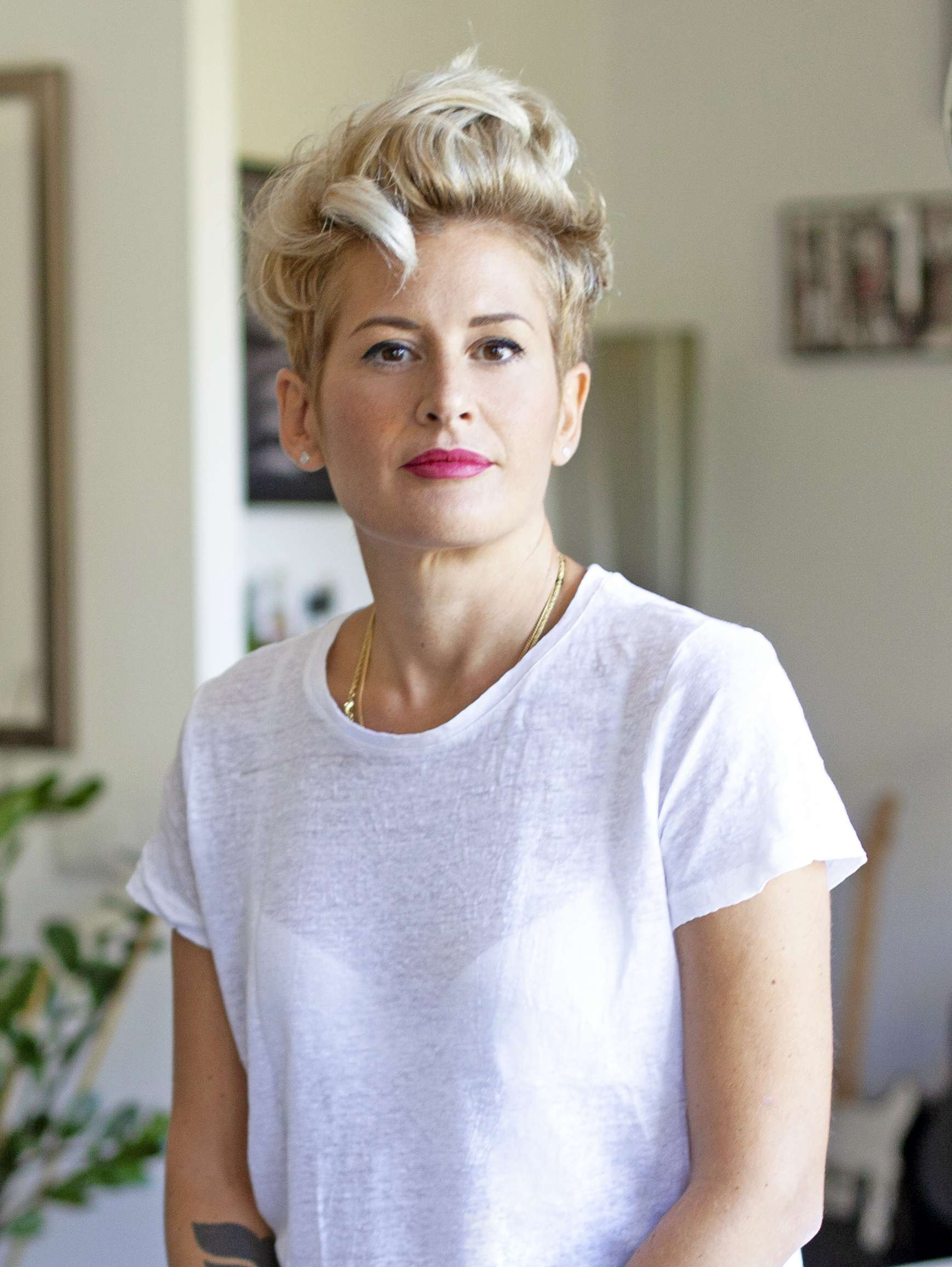 Primo piano di Angela Rafanelli